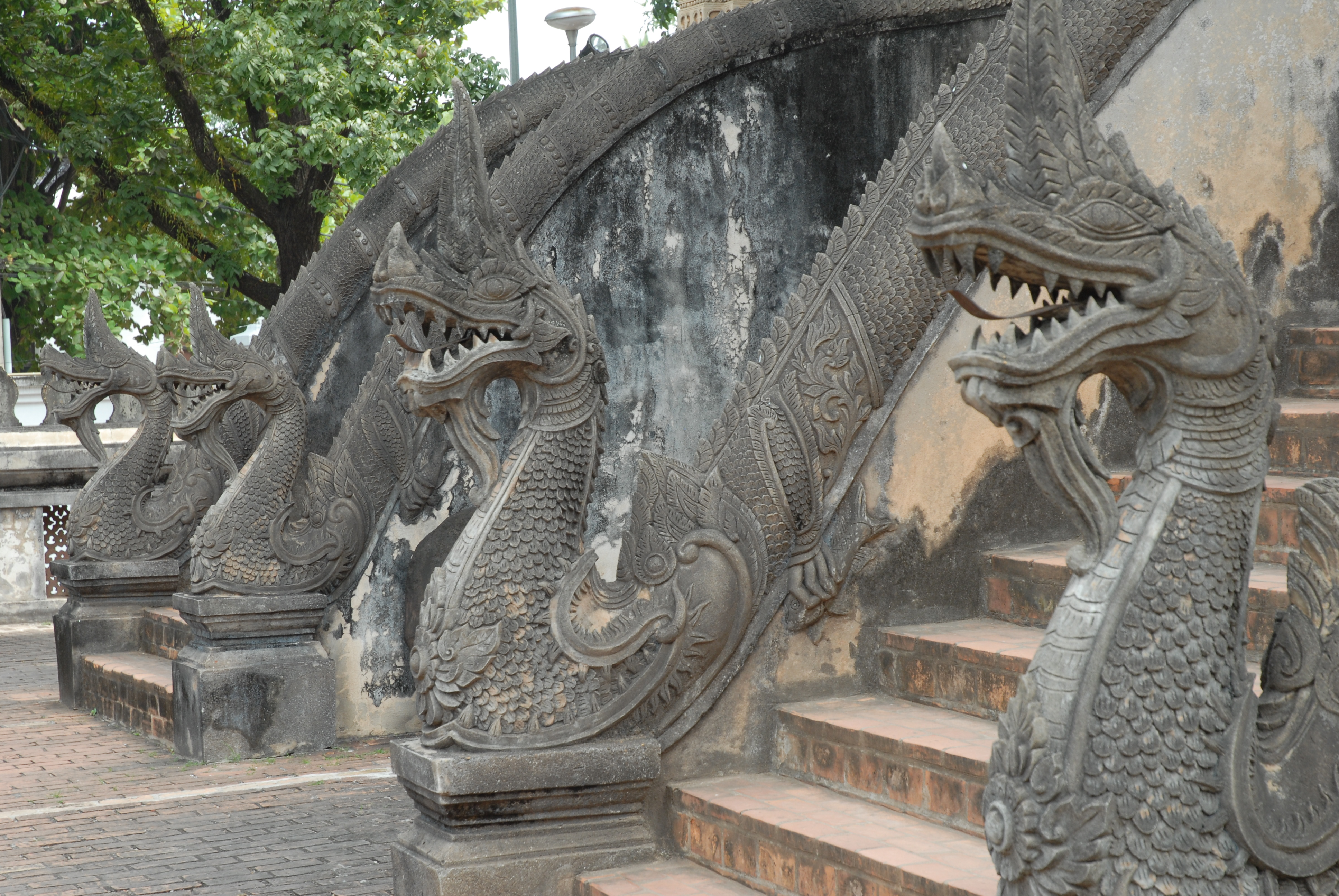 Pagode Vat Phra Kèo à Vientiane : rampes d'escaliers, constituées de dragons